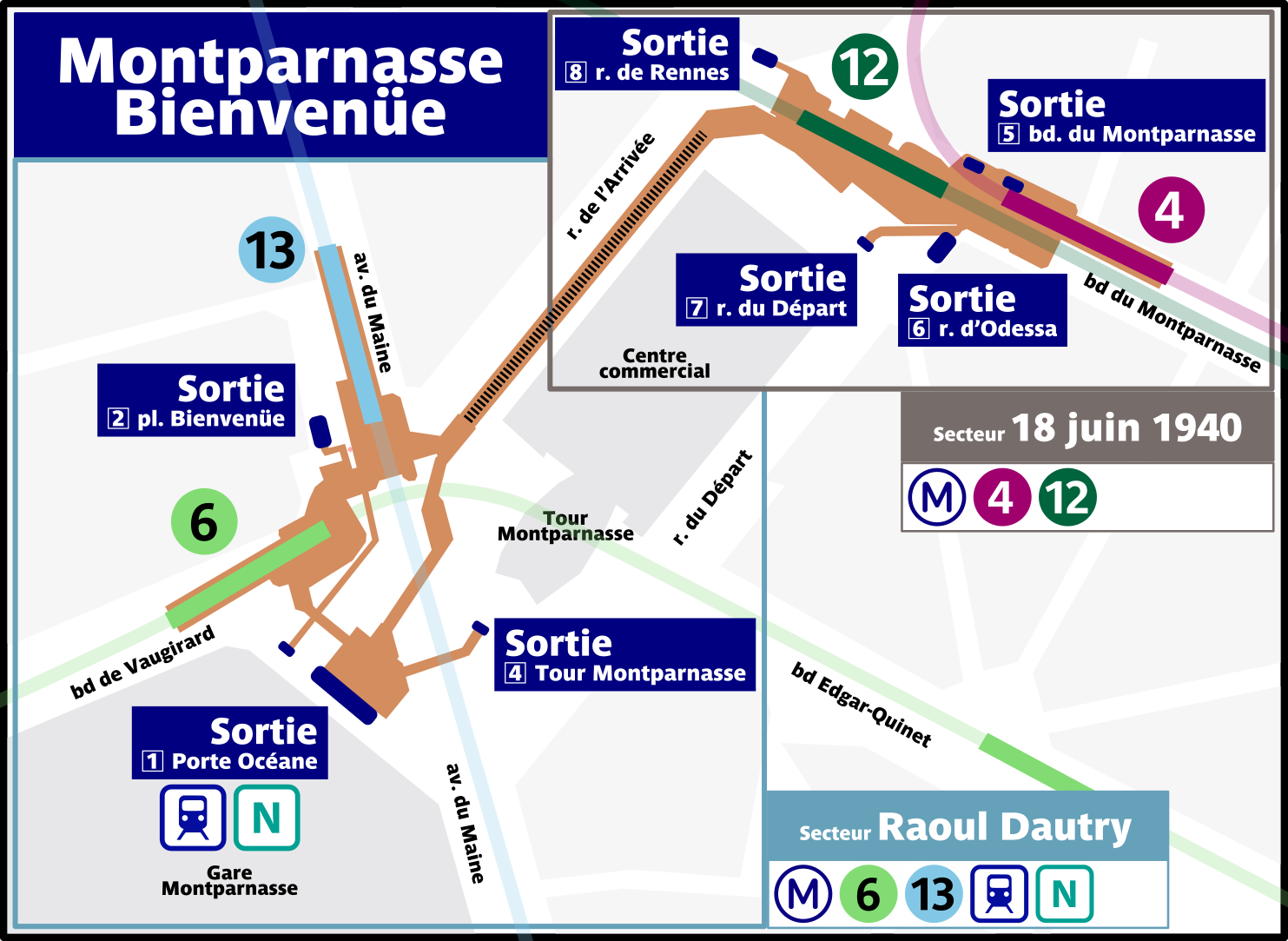 Plan schématique des couloirs de la station de métro Montparnasse-Bienvenüe, à Paris, France.